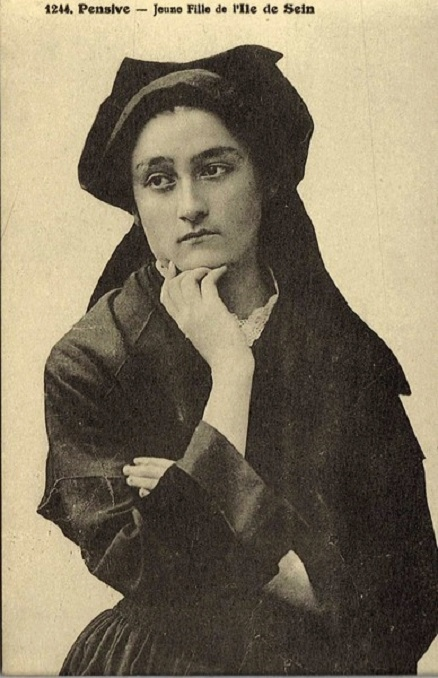 Jeune fille de l'Île de Sein (carte postale début XXème siècle, collection Emile Hamonic, Saint-Brieuc) portant la tenue noire dite en breton Jibilinenn